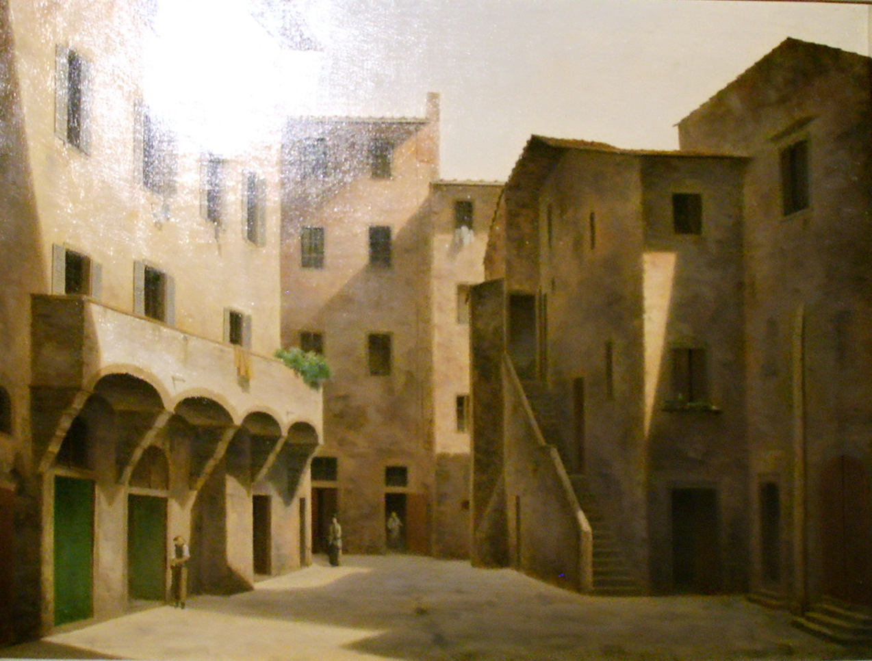 Fabio borbottoni, 1820-1902, piazza della luna nel mercato vecchio